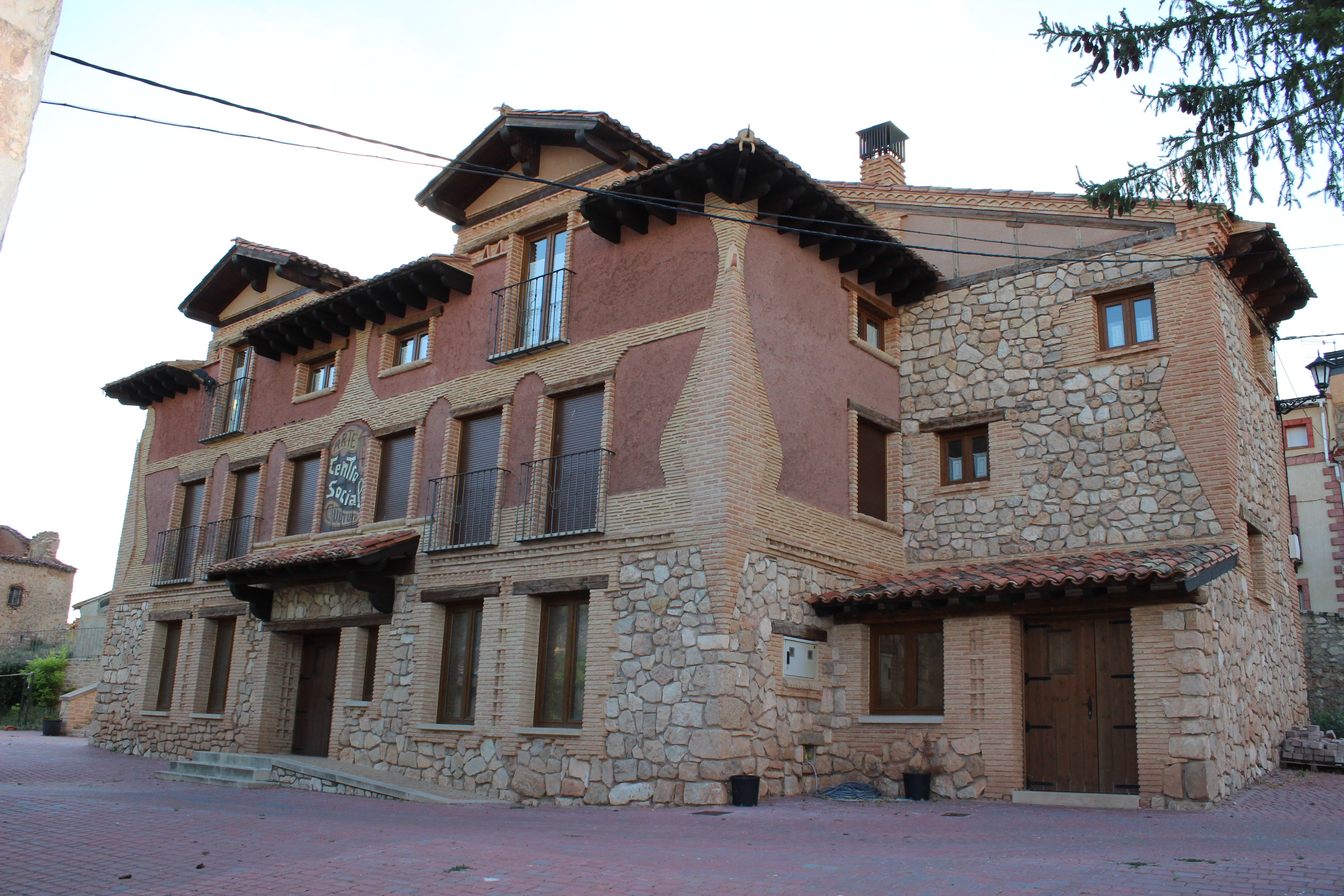 Antiguo cuartel de Tierzo, hoy centro social y cultural